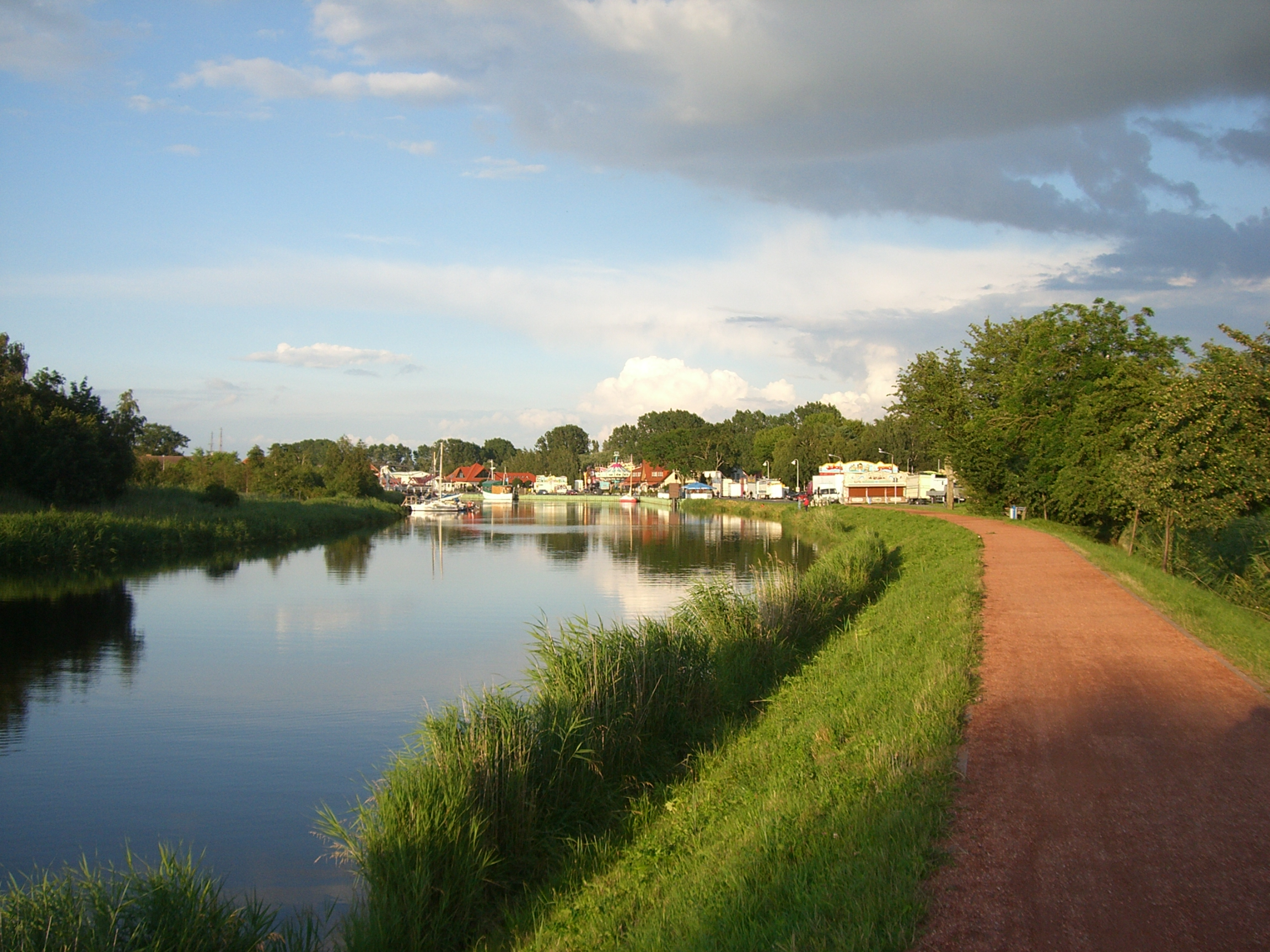 Greifswald, Fluß/river Ryck